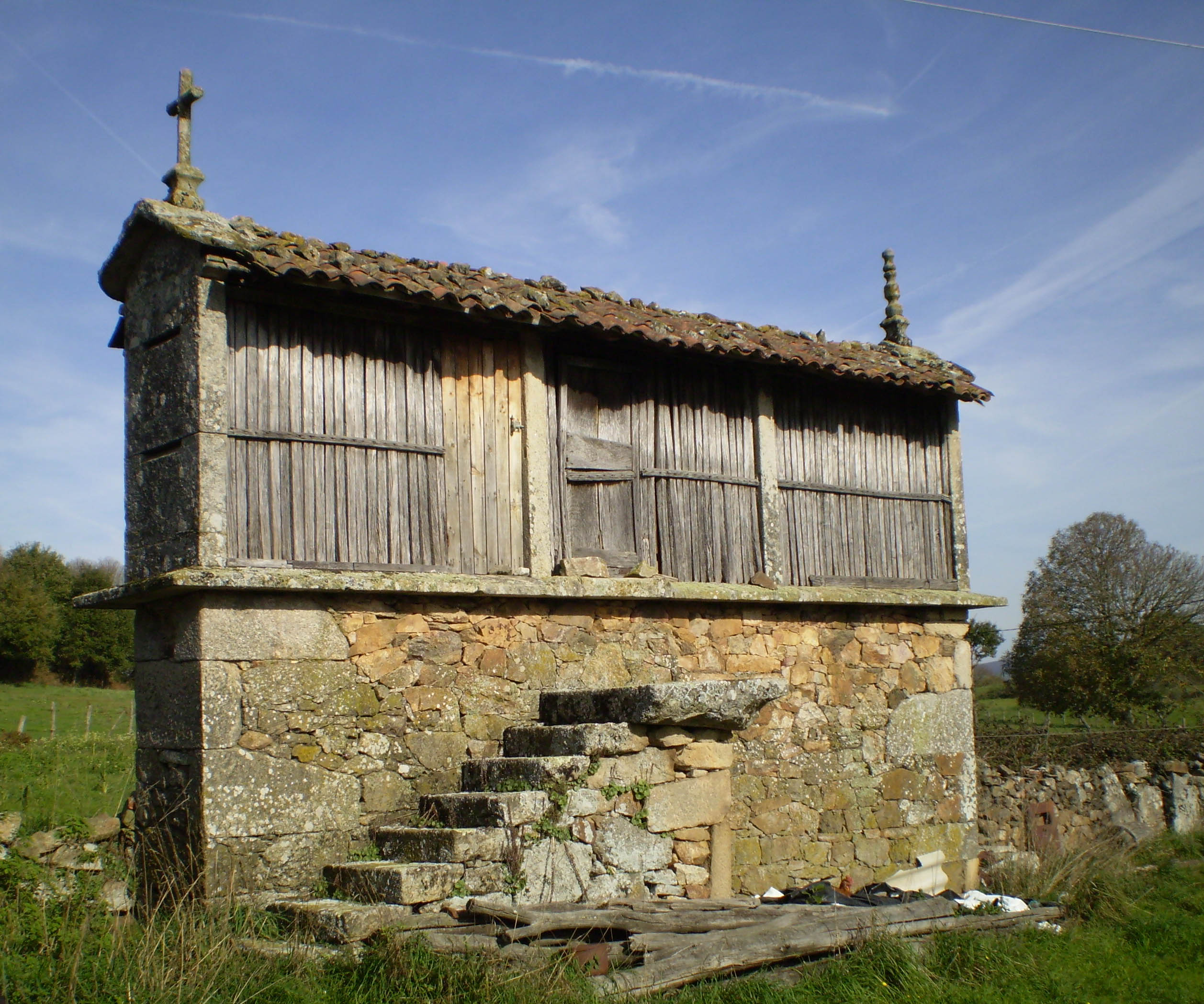 Hórreo tipo mahía, de tres claros, elevado sobre soleira de mampostería, con escaleiras laterais da mesma fábrica. Cuberto con tella do país e adornado con cruz latina e lampión fusiforme. Ubicado no lugar de Gondoriz, parroquia de Olveda no Concello lugués de Antas de Ulla.